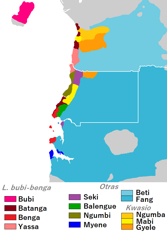 Lenguas africanas de Guinea Ecuatorial y su entorno. Lenguas criollas no incluídas.